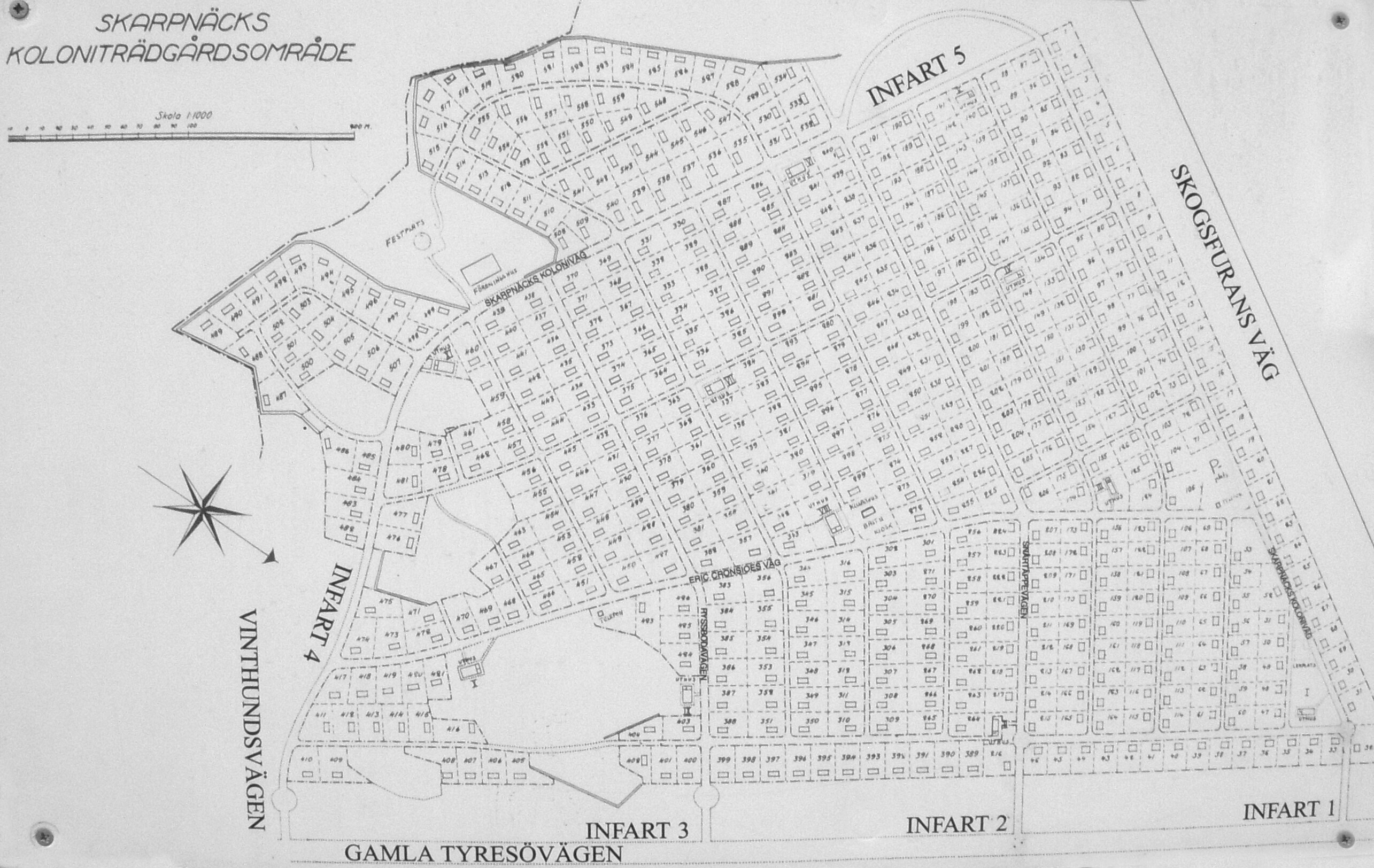 Skarpnäcks koloniområde, översiktskarta